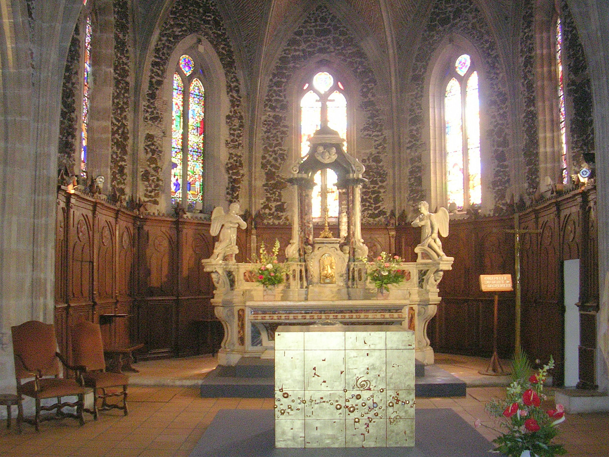 Église Saint-Martin de Biscarrosse , dans le département français des Landes